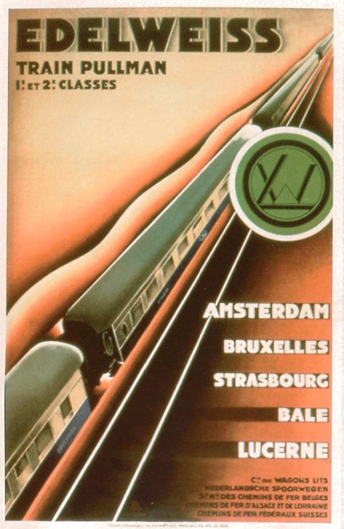 Plakat für den CIWL-Pullmanzug "Edelweiss", 1928